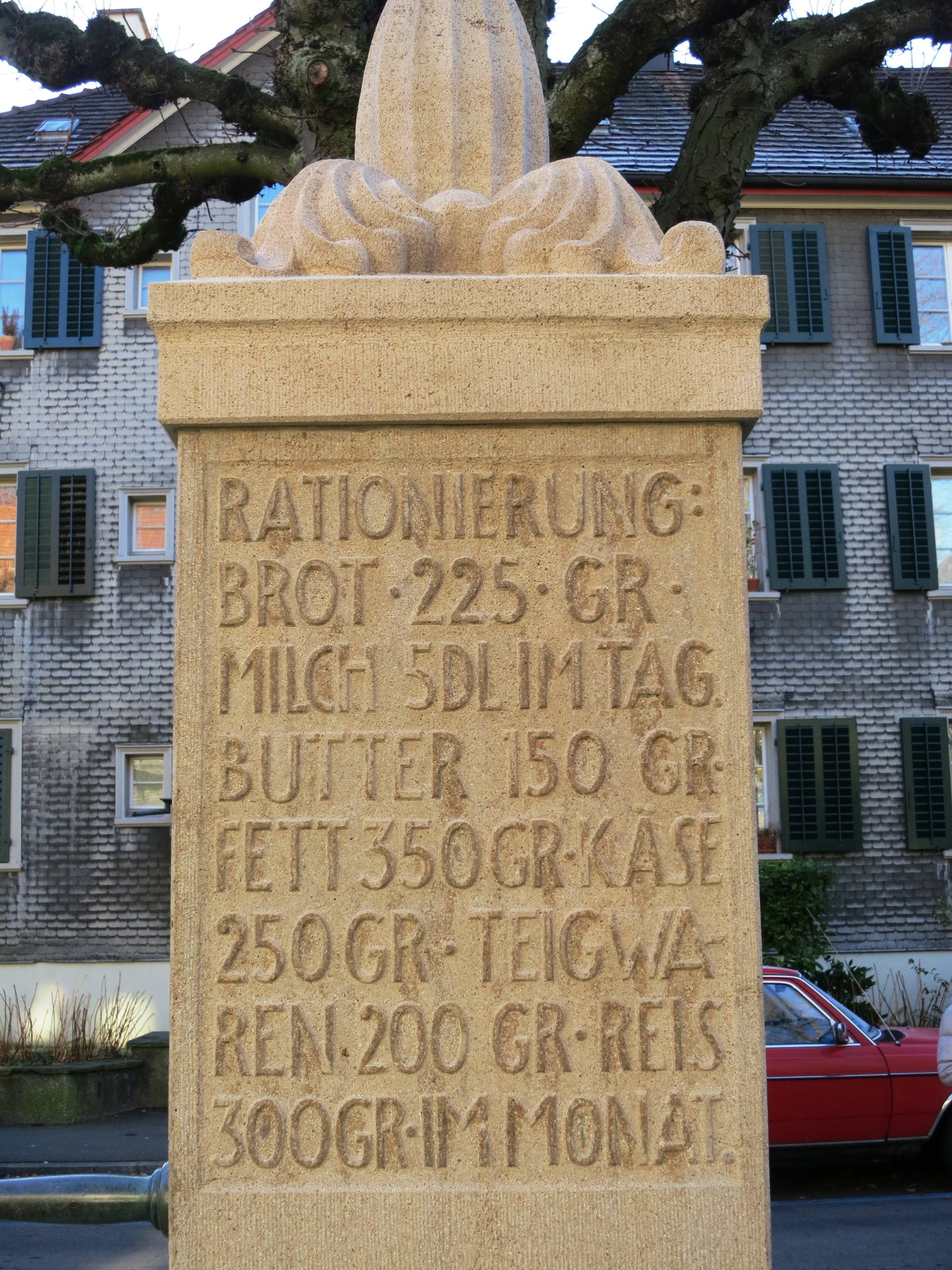 Rationierung 1914-18, Zürich-Wipkingen, Schweiz